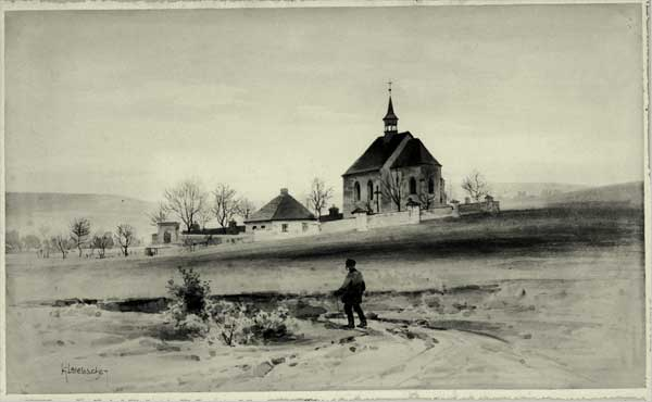 Česky: Rakovník, kostelík sv. Jiljí